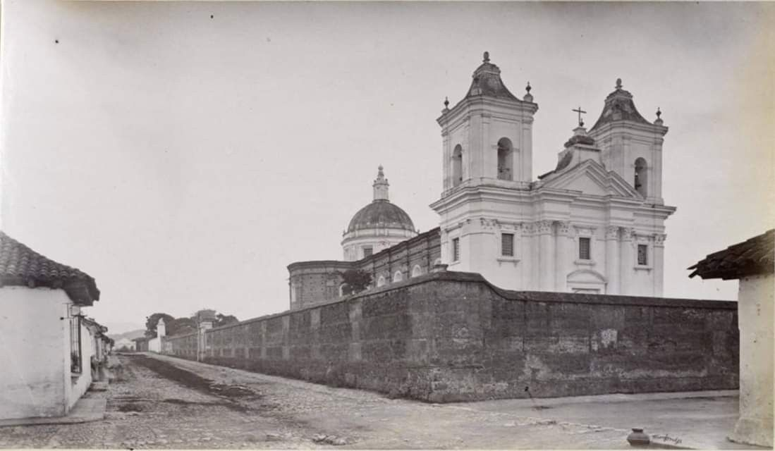 Iglesia de la recolección en 1875